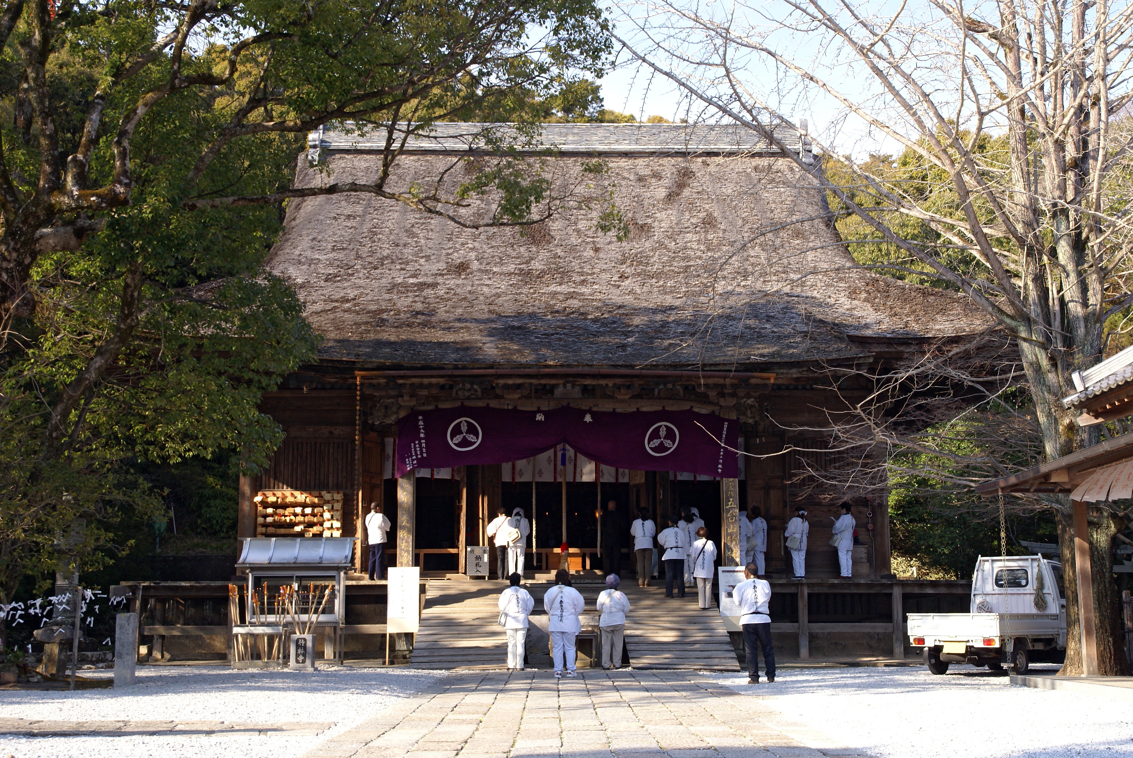 Chikurinji in Kochi, Kochi prefecture, Japan